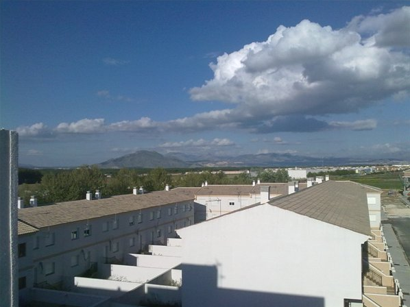 Casas en la calle Jaén, en la localidad de Láchar (Granada, España). Cijuela (en la parte superior derecha) y Sierra Elvira (parte superior izquierda) al fondo. Recorte de una foto hecha por mí.